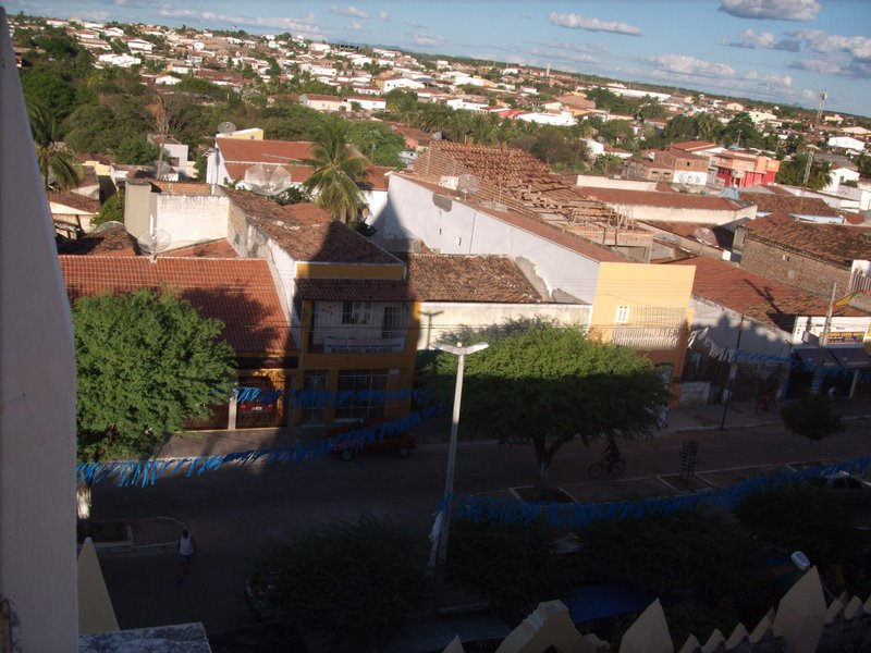 Vista parcial da cidade.